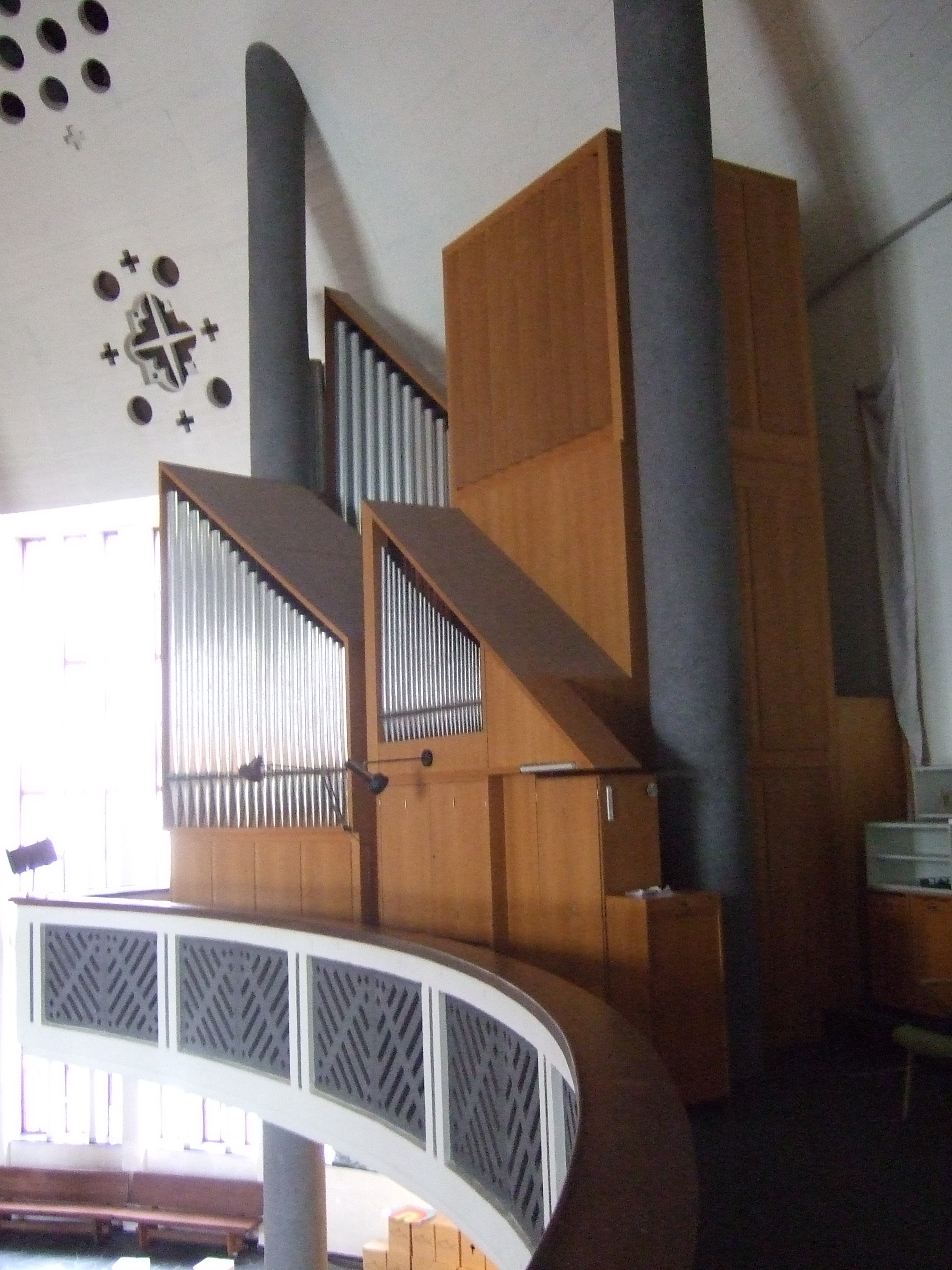 Kreuzkirche Kassel Orgel